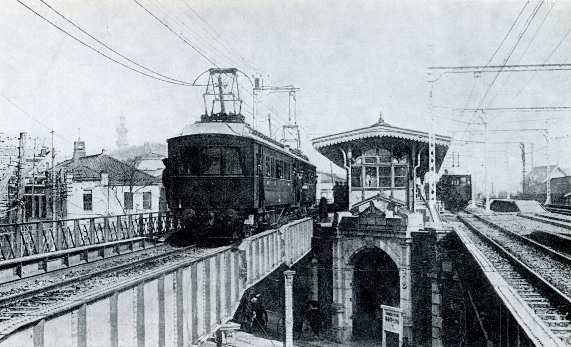 元々は「東京市街高架鐡道建築概要」(鉄道院東京改良事務所、1914年12月15日印刷・18日発行) 掲載写真。 川上幸義「新日本鉄道史」では「デハ6240形・デロハ6130形2両編成の試運転電車(ローラパンタグラフに注意)」「有楽町 大正2年(1913年)頃」とあるが、デロハ6130形は大正3年(1914年)製造なので矛盾する。デハ6240形は存在しない形式である。 毎日フォトバンクに「大正・有楽町で京浜線の新型電車試運転」「東京－高島町間に省線電車が運行開始」のタイトルで同じ写真がある。